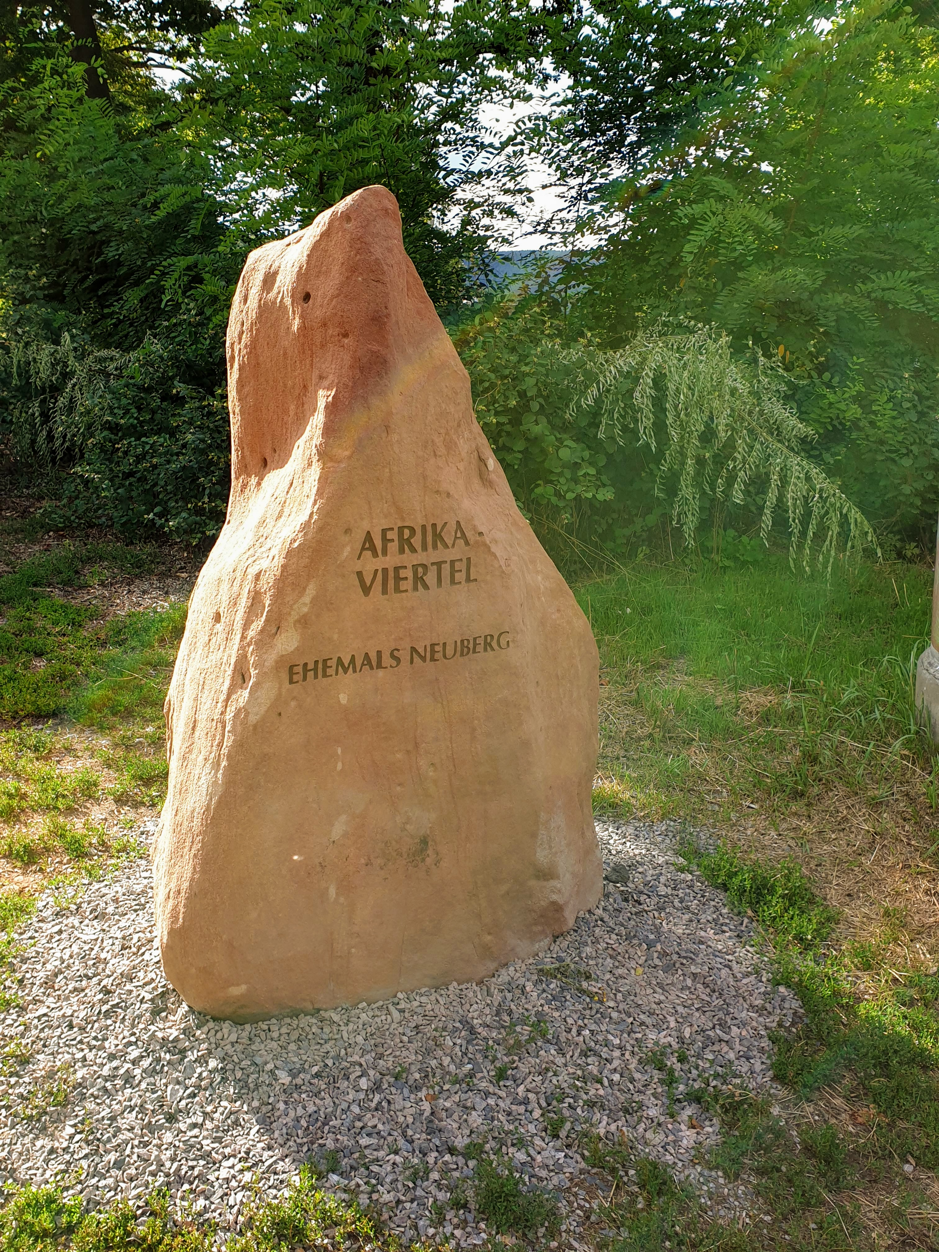 Sandsteinfindung aus rotem Sandstein am Randes des Afrikaviertels in Neustadt